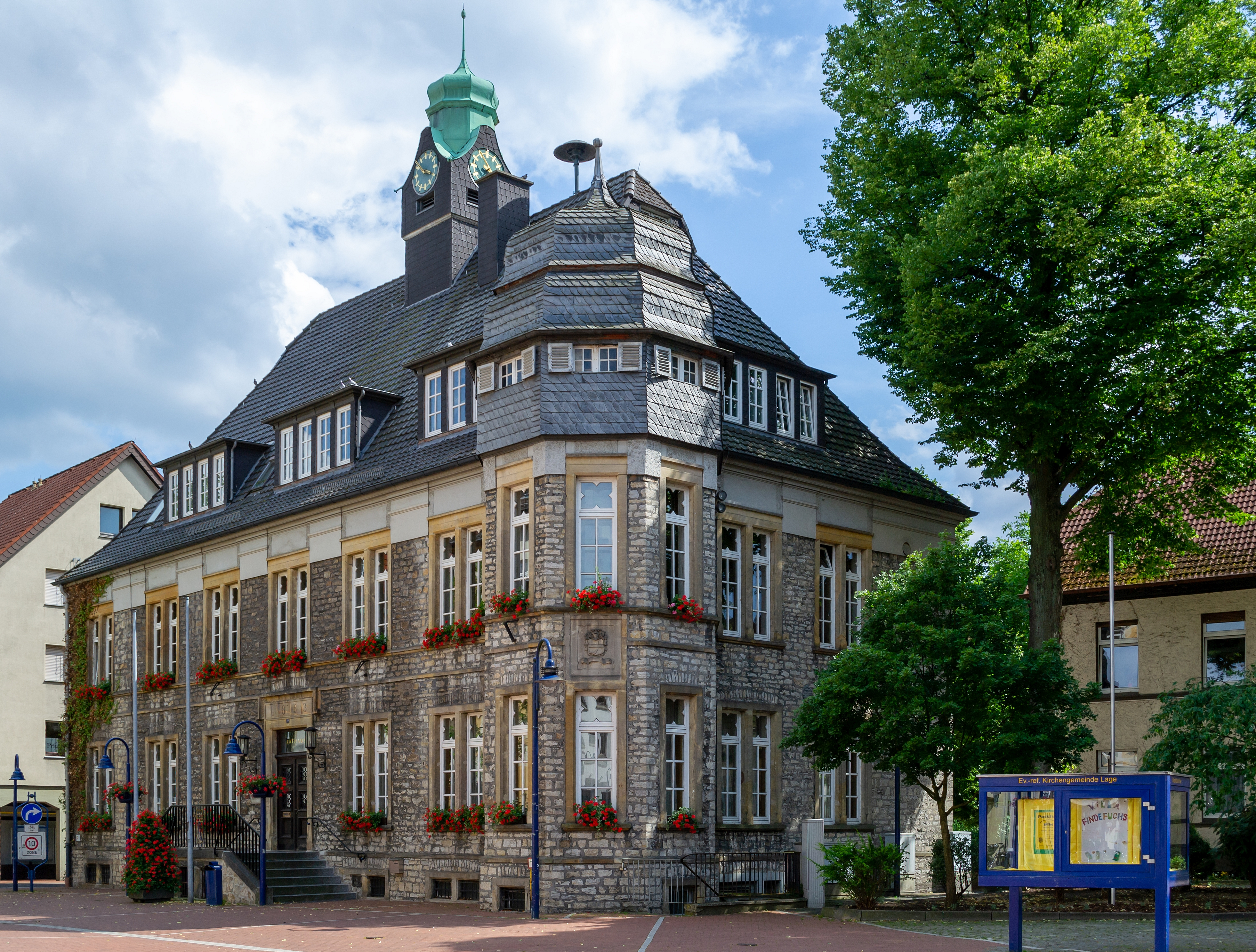 Altes Rathaus This is a photograph of an architectural monument.